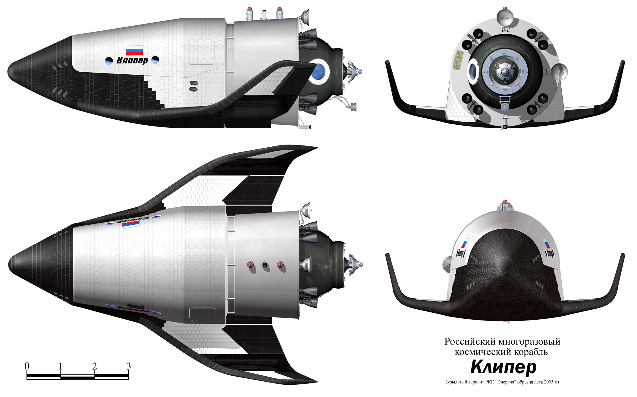 Infografia del Kliper (Клипер)